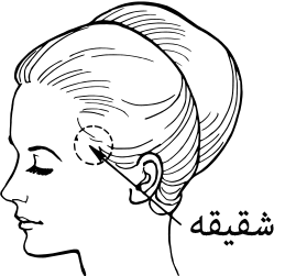 نمایان‌گر مکان شقیقه در سر یک زن.